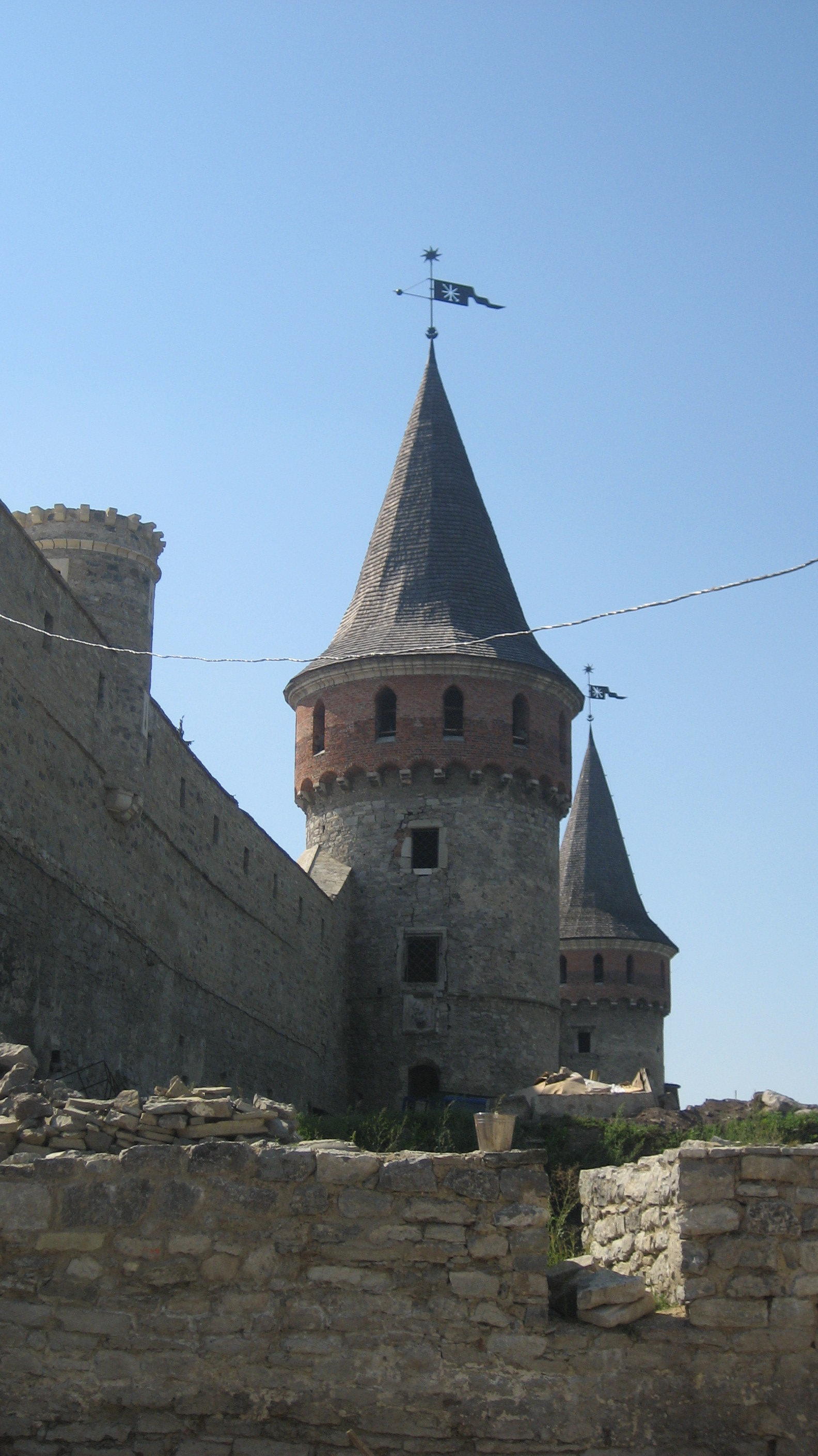 Лянцкоронська Башта з Рожанською